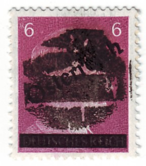 Austria 1945 Vienna, Kork